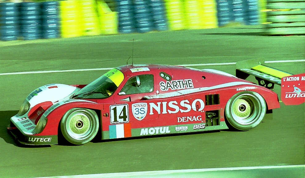 Courage C30LM n°14 aux 24 Heures du Mans 1993